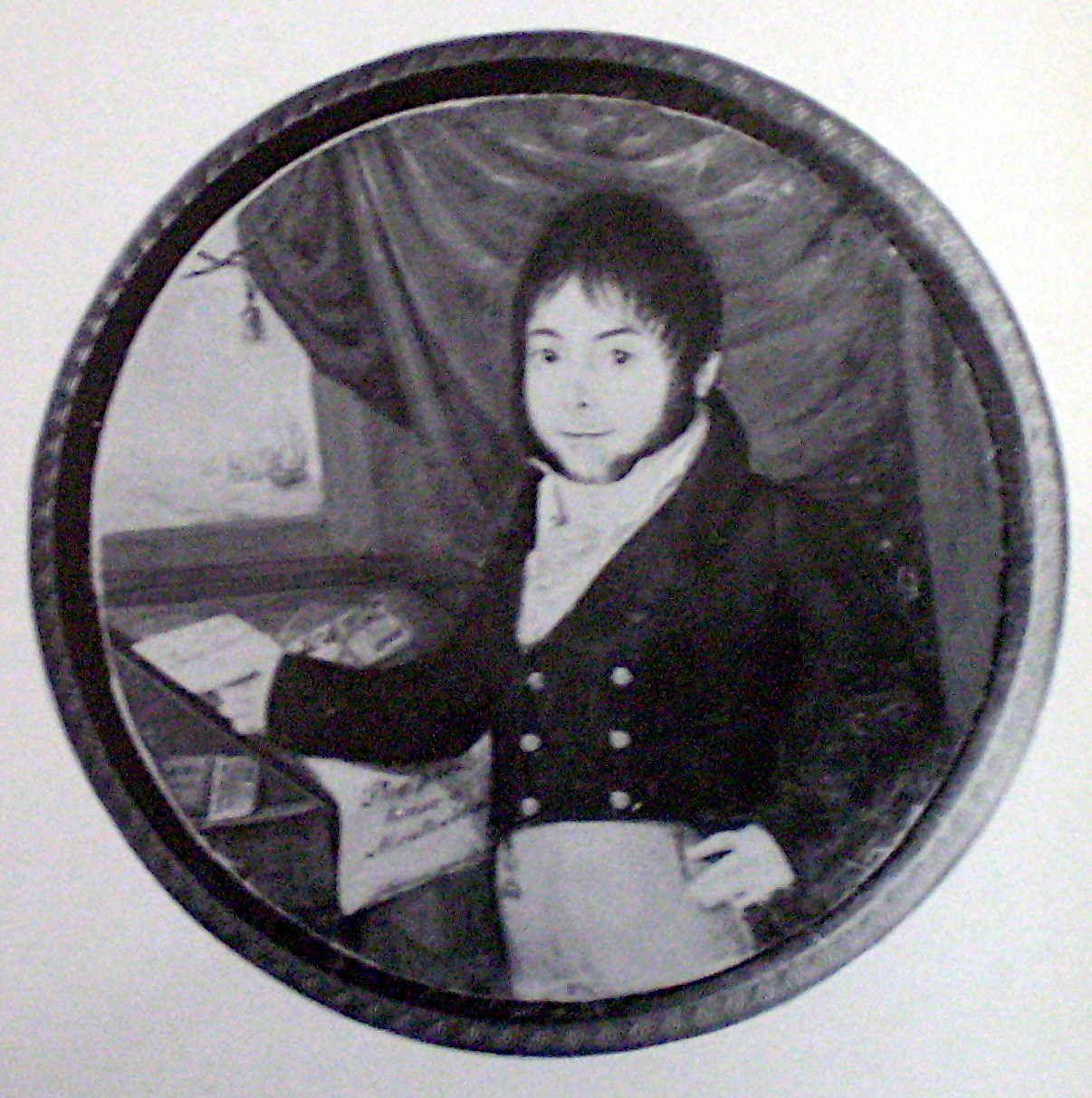 Juan Larrea. Miniatura. MHN